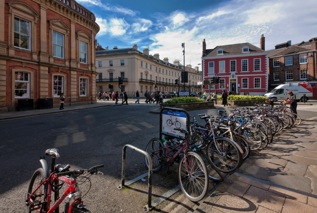 Blake St, York